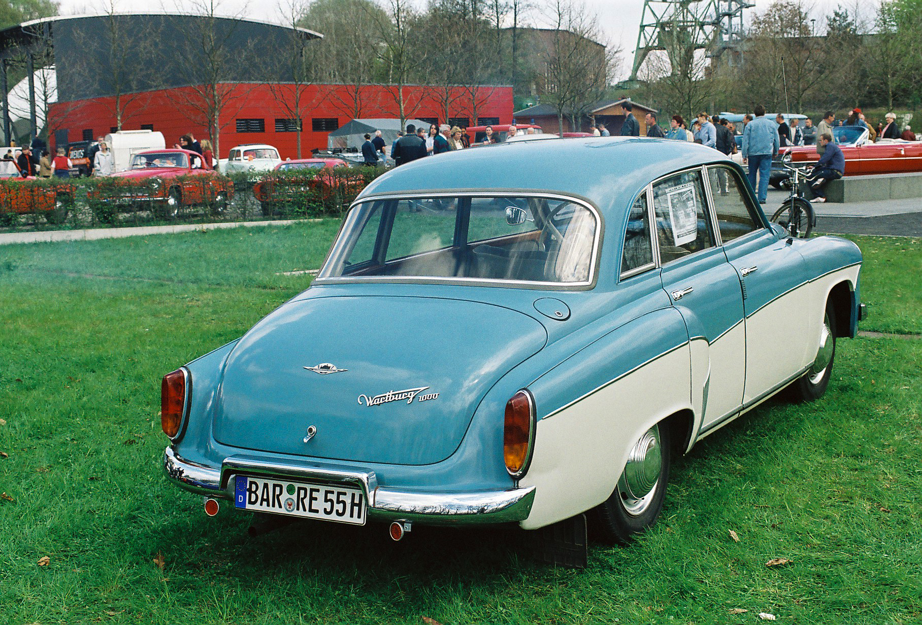 historischer Wartburg beim Oldtimertreffen im Familiengarten Eberswalde